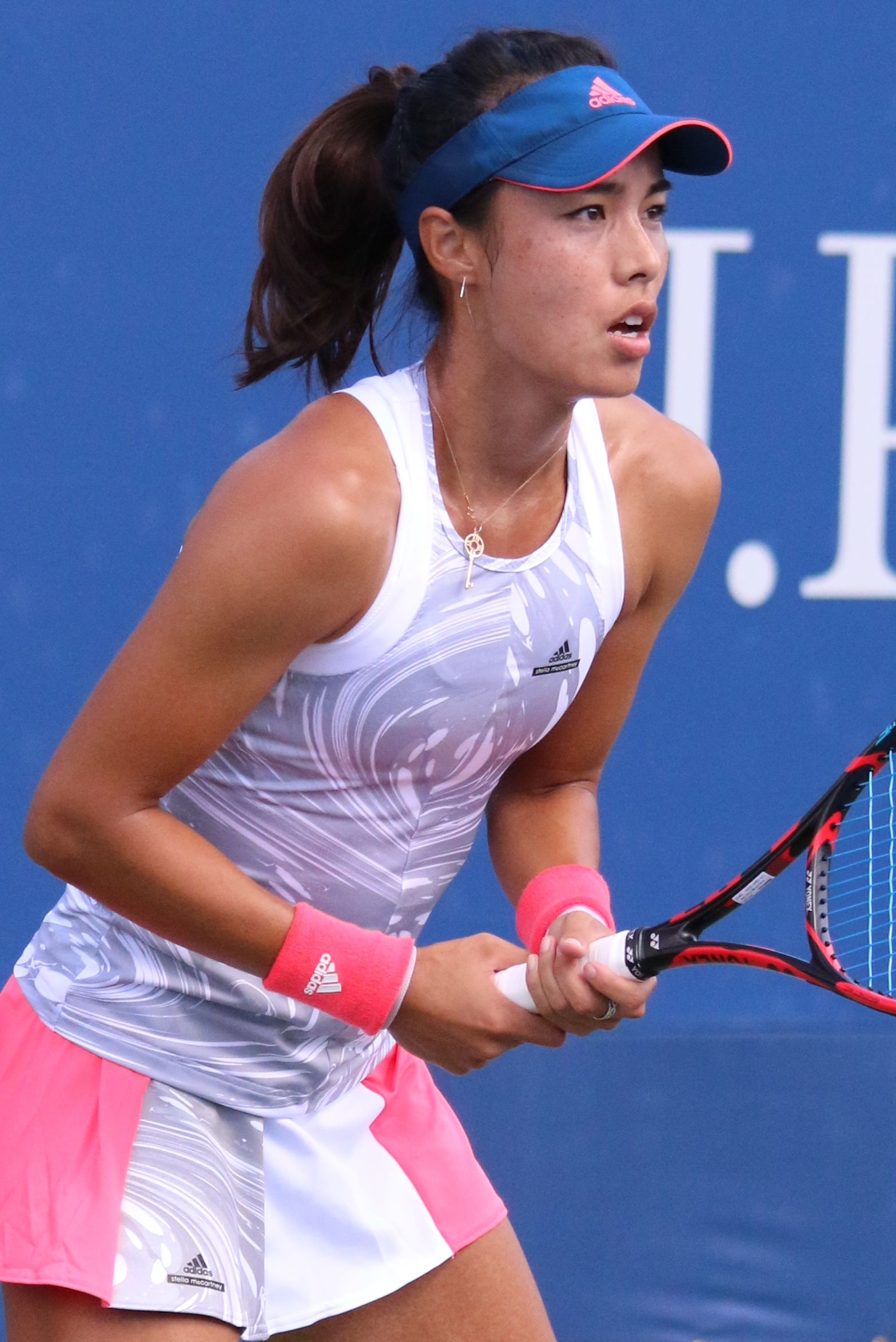 Wang Q. US16 (2)